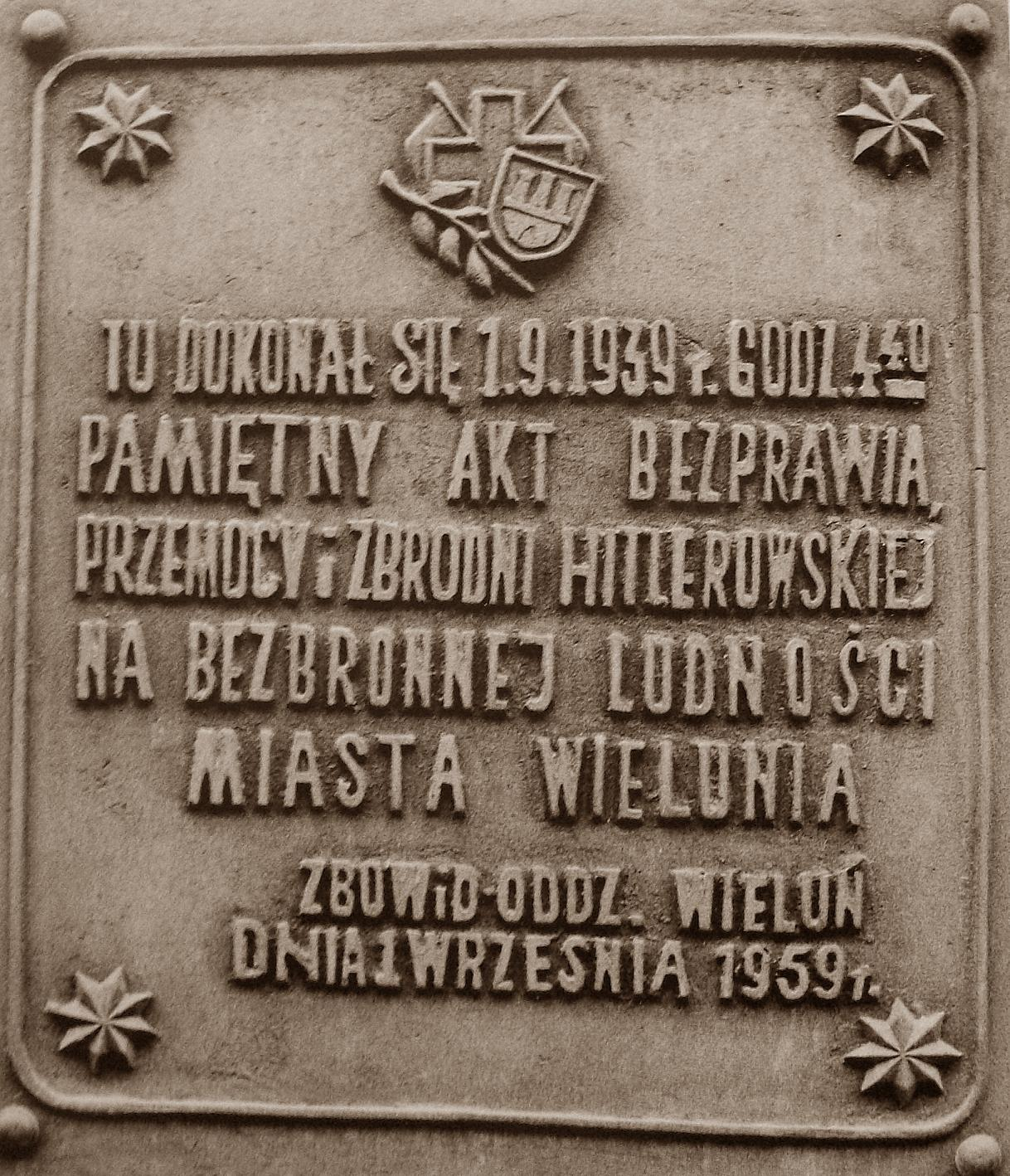 Tablica pamiątkowa, poświęcona bombardowaniu szpitala Wszystkich Świętych w Wieluniu. Tablica od września 1959 roku do sierpnia roku 2009 znajdowała się na ścianie II LO. Obecnie znajduje się w izbie pamięci zlokalizowanej w II LO, a w miejscu gdzie się znajdowała pierwotnie zlokalizowano nową tablicę.